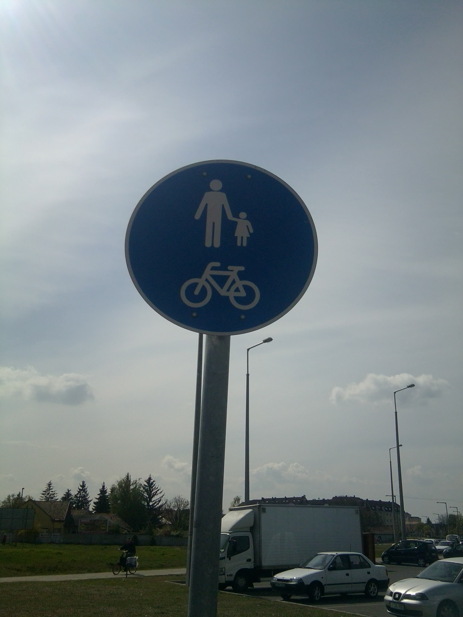 „Közös Gyalog- és kerékpárút” közúti jelzőtábla Balassagyarmaton